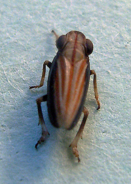 Männchen einer Moorkäferzikade (Ommatidiotus dissimilis), Präparat, Nordwestdeutschland